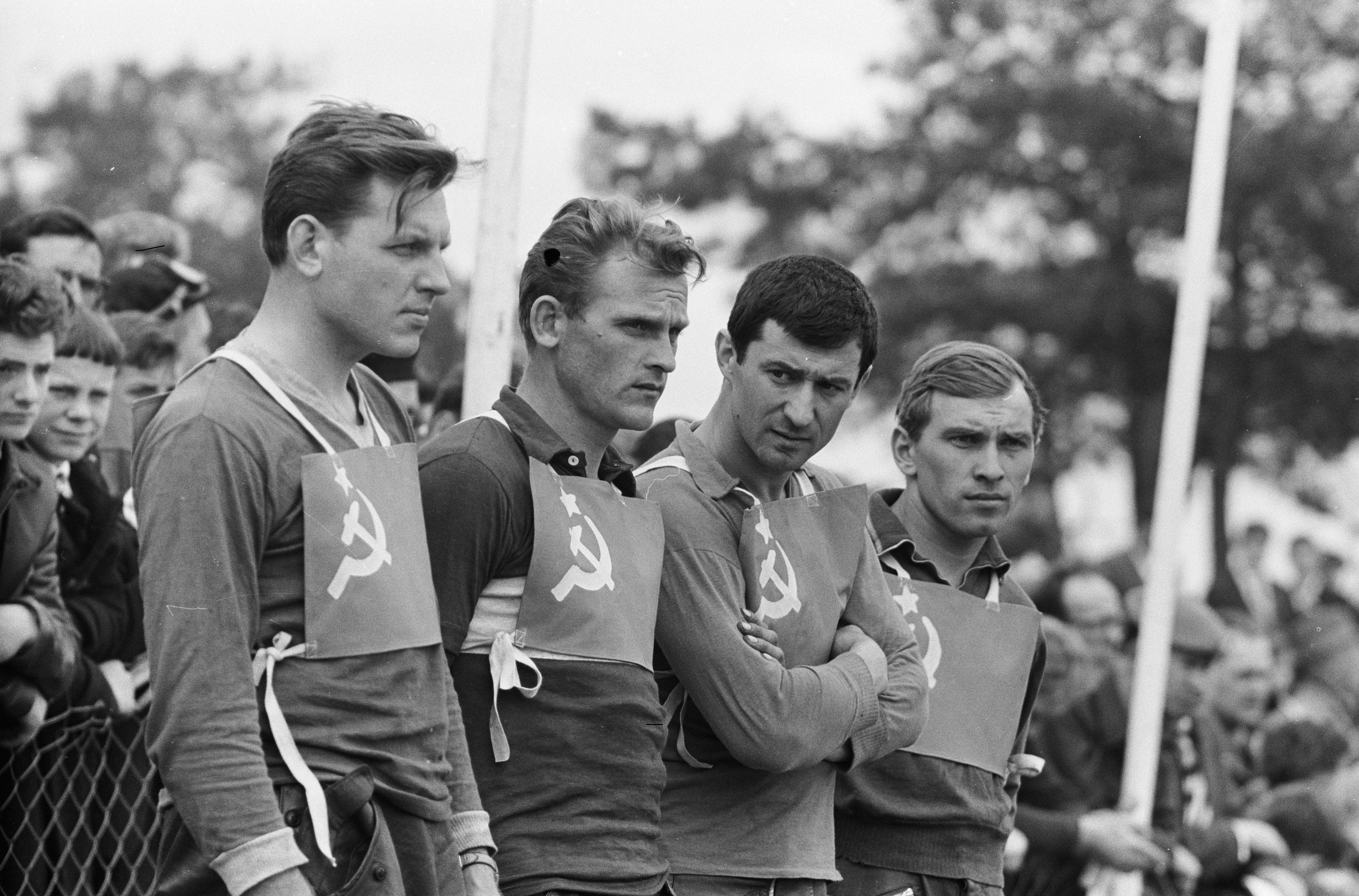 Collectie / Archief : Fotocollectie Anefo Reportage / Serie : [ onbekend ] Beschrijving : Motorcross 1962 De Zandberg te Bergharen (4 Russische coureurs Audrey, Igar, Reinis en Arkadij) Datum : 3 juni 1962 Locatie : Bergharen Persoonsnaam : From left to right: Reinis Rešetnieks, Sergei Kaduskin(?), Andrei Dezhinov and Igor Grigoriev Trefwoorden : motorcross Fotograaf : Pot, Harry / Anefo, [onbekend] Auteursrechthebbende : Nationaal Archief Materiaalsoort : Negatief (zwart/wit) Nummer archiefinventaris : bekijk toegang 2.24.01.05 Bestanddeelnummer : 913-9874